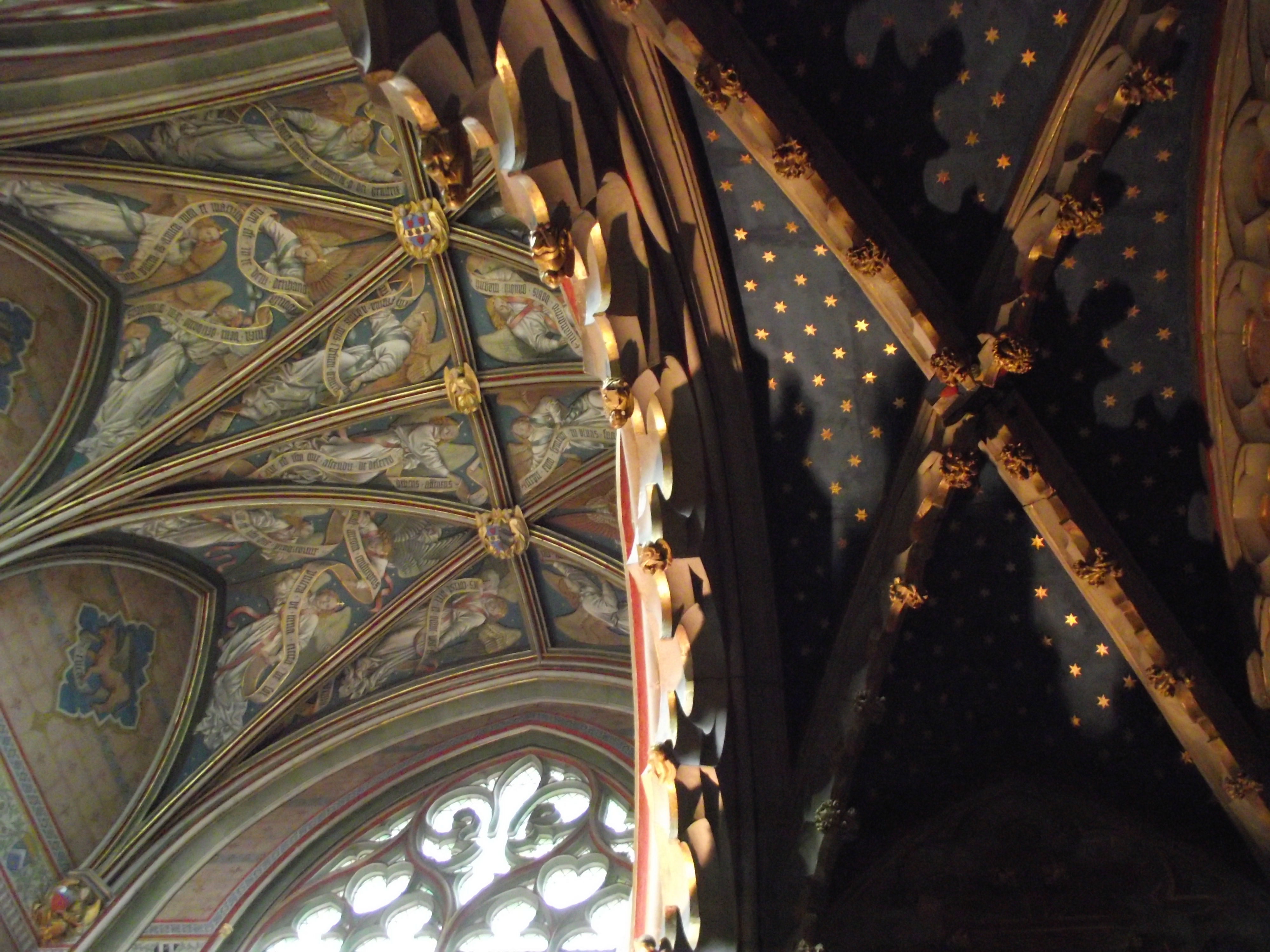 Bourges, Palais Jacques-Cœur, Chapelle